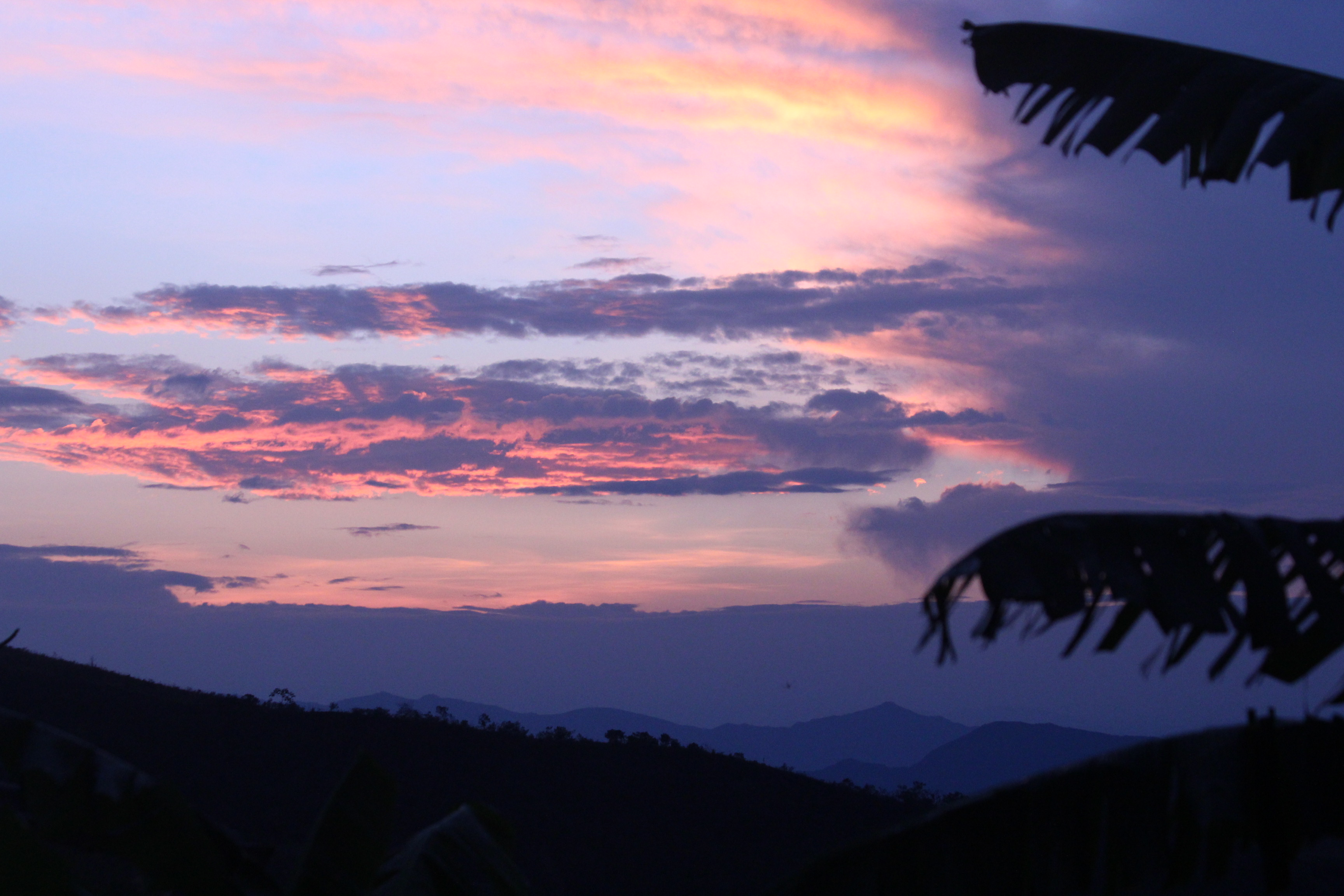 Esta fotografía fue tomada en el municipio colombiano con código 41306.